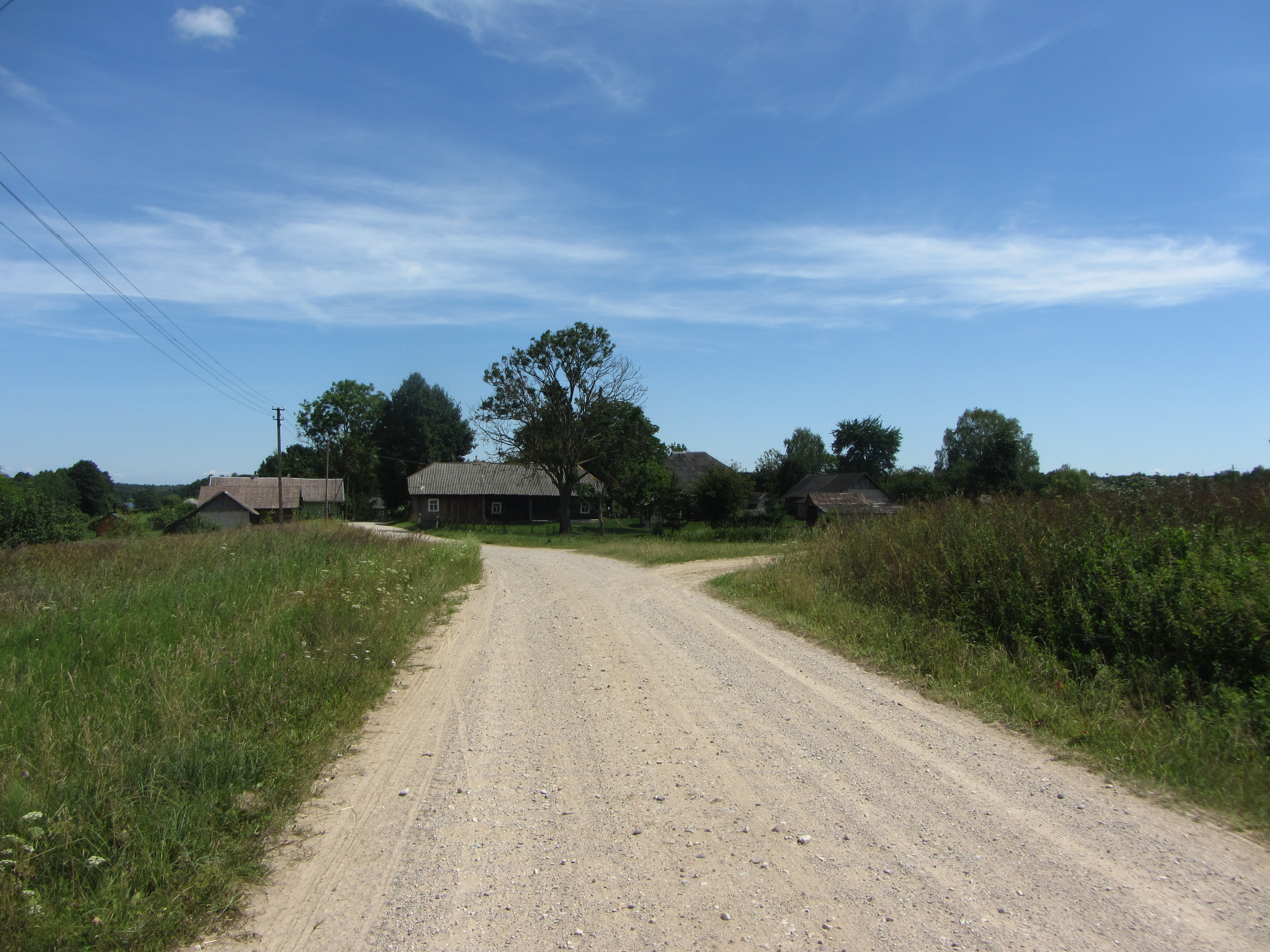 Graužiniai 33222, Lithuania